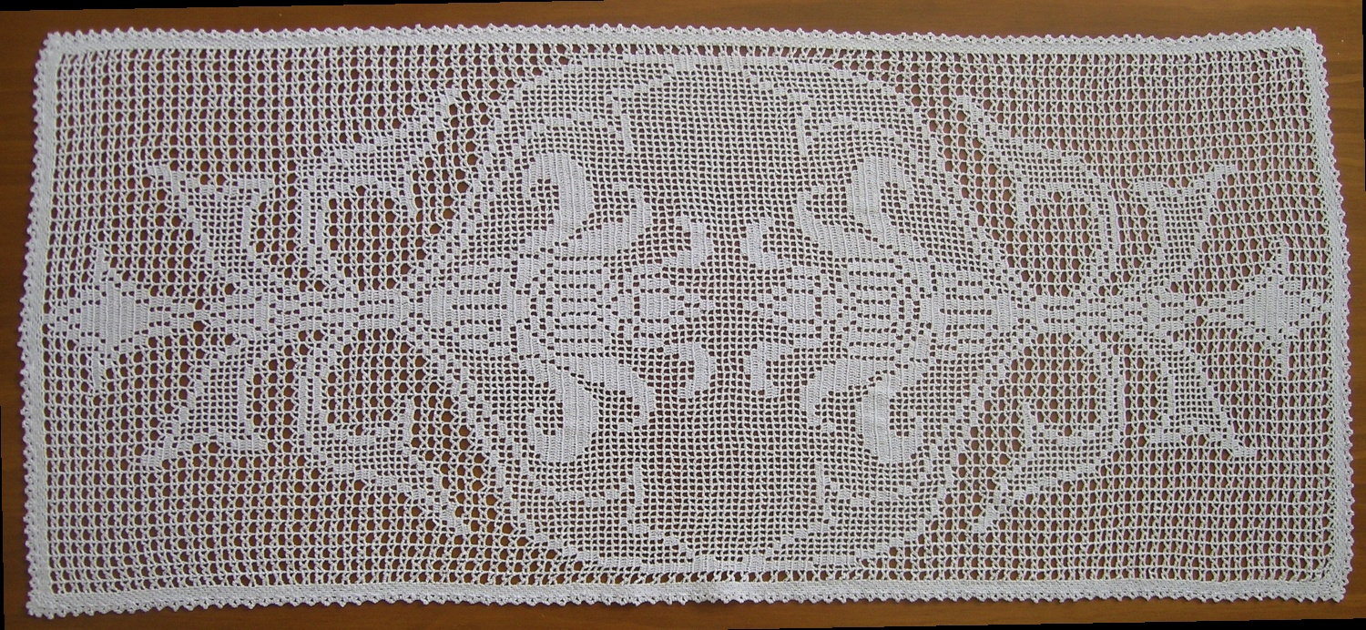 Filet Crochet table runner